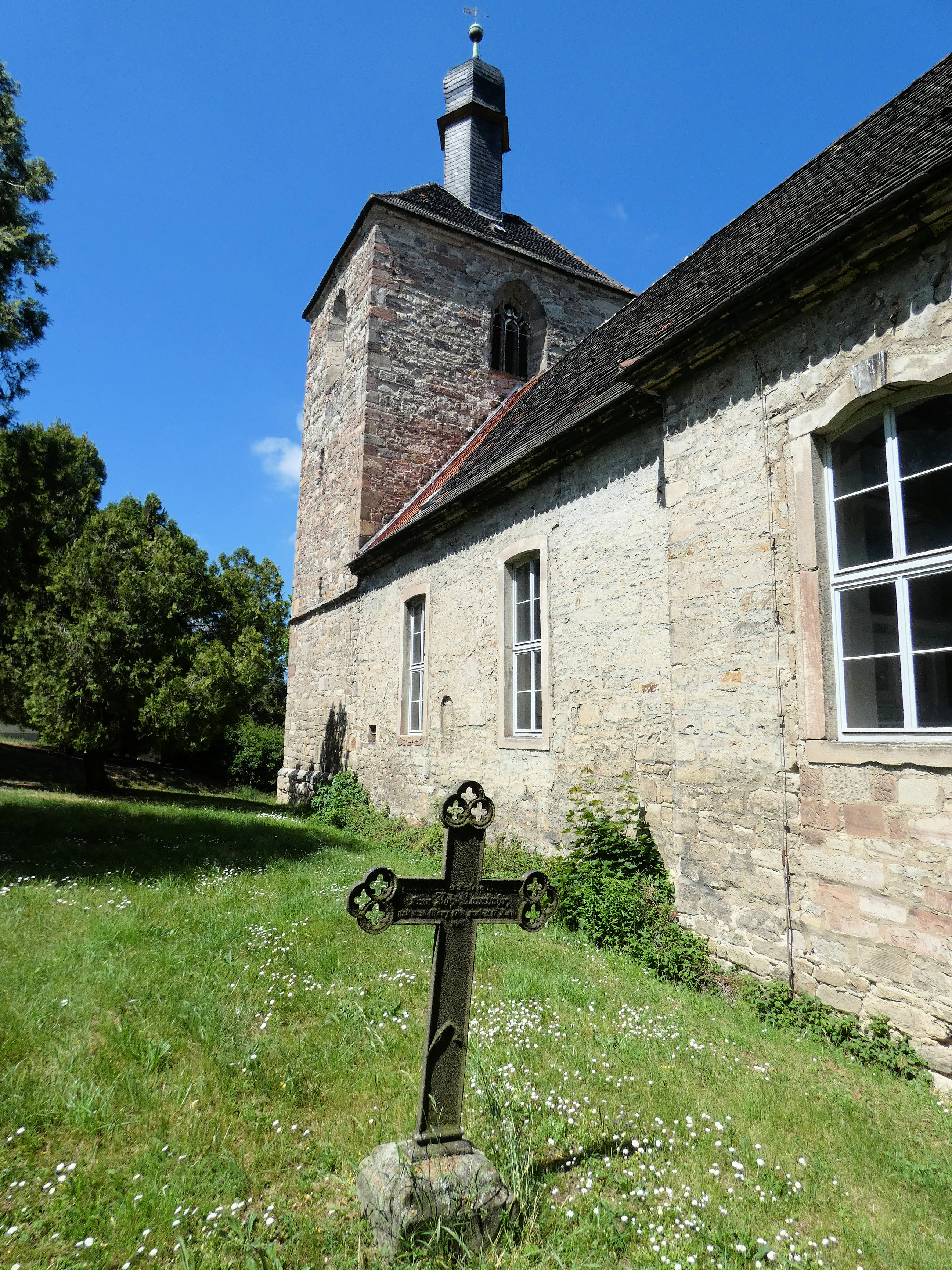 Kirche St. Viti in Teutschenthal, Saalekreis, Südseite